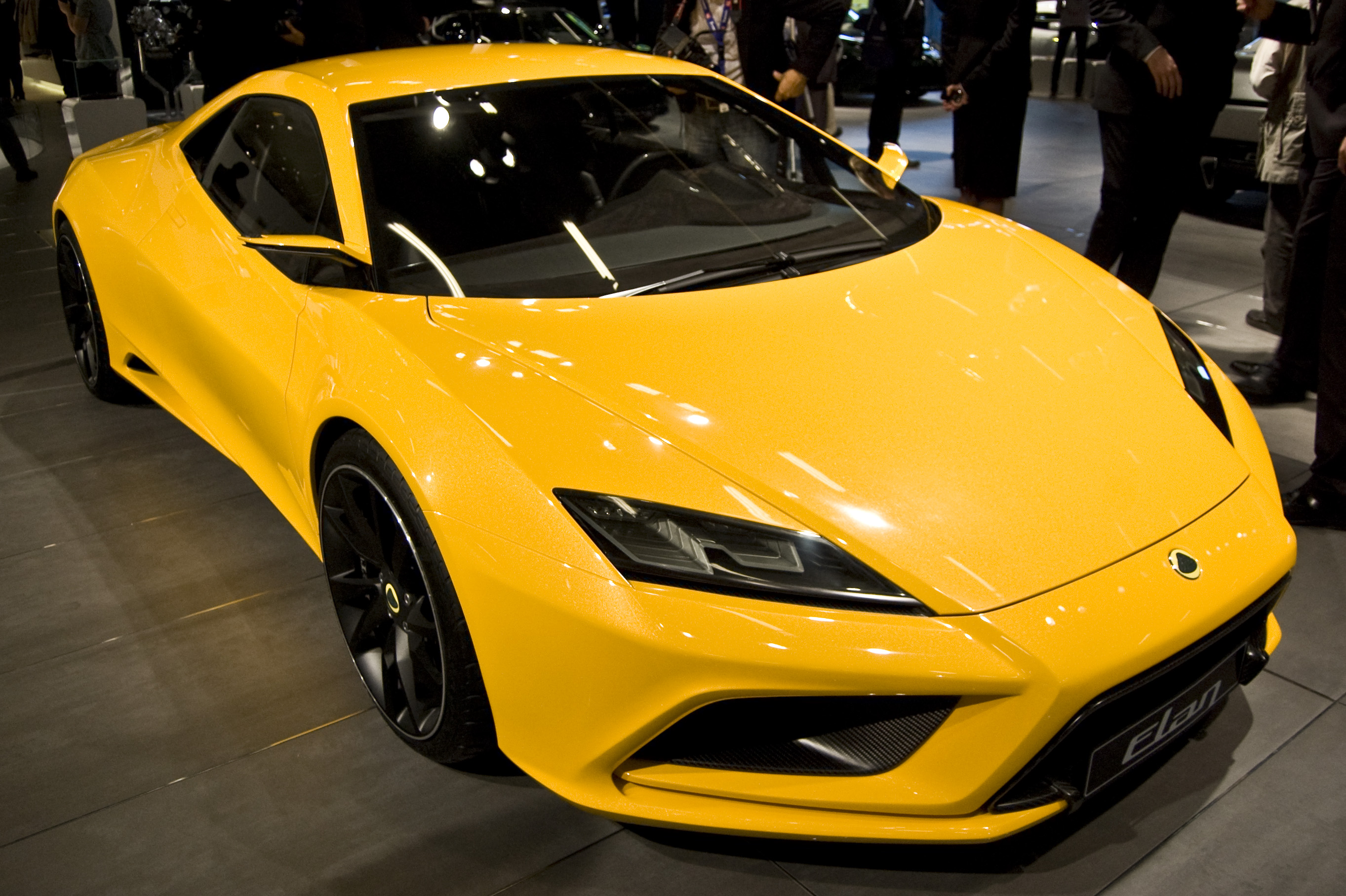 Lotus Elan Concept en el Salón de París de 2010.